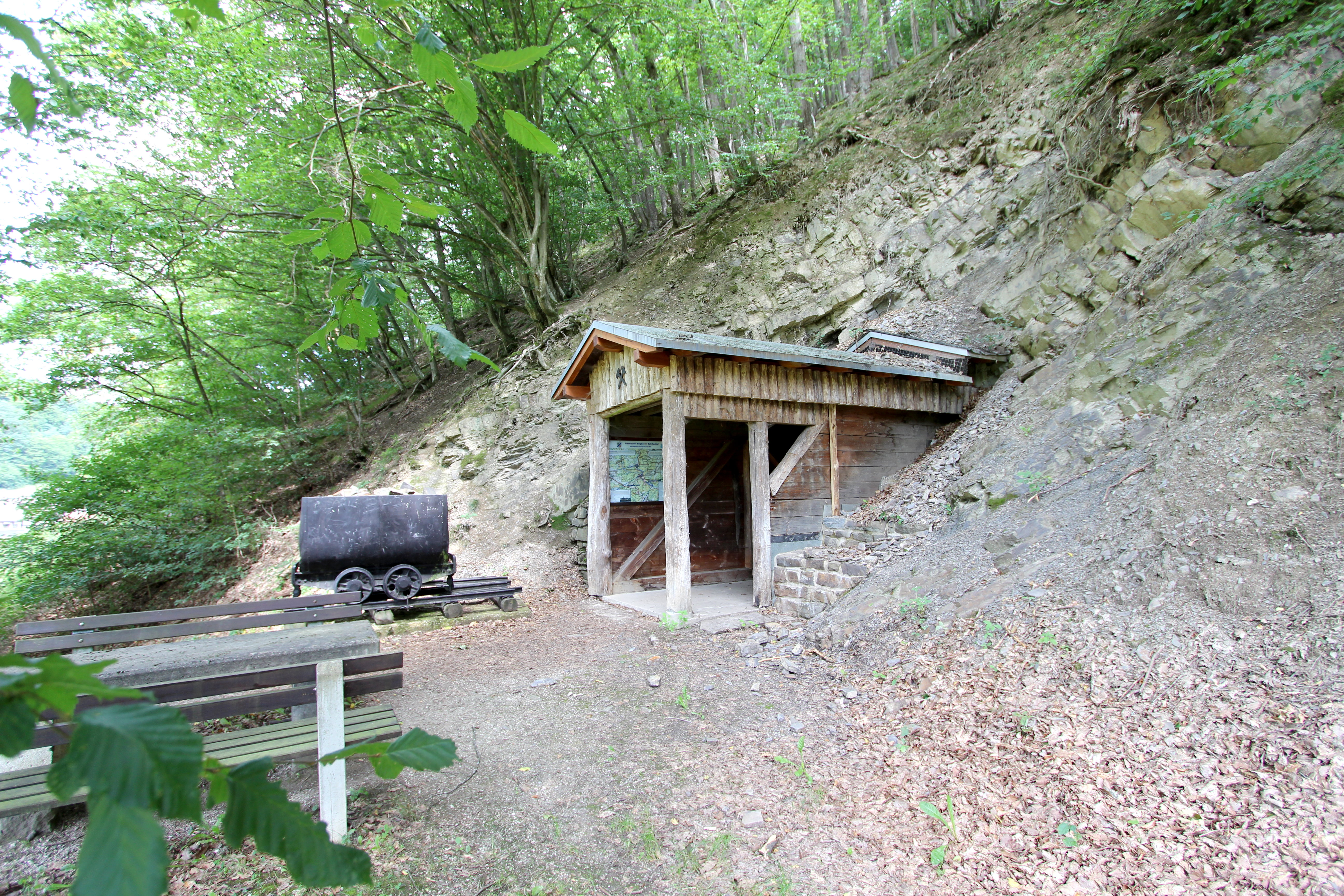 53505 Kirchsahr, Ortsteil Binzenbach. Bergwerksstollen. Am “Gertelstollen” zeigen Karten die Lage der alten Stolleneingänge und geben Auskunft über die verschiedenen Erze, die in Kirchsahr gefördert wurden. Der Stollenmund ist so gestaltet, dass man in den Stollen schauen kann. Vor dem Stollen ist eine alte Lore restauriert worden. Aufnahme von 2017.